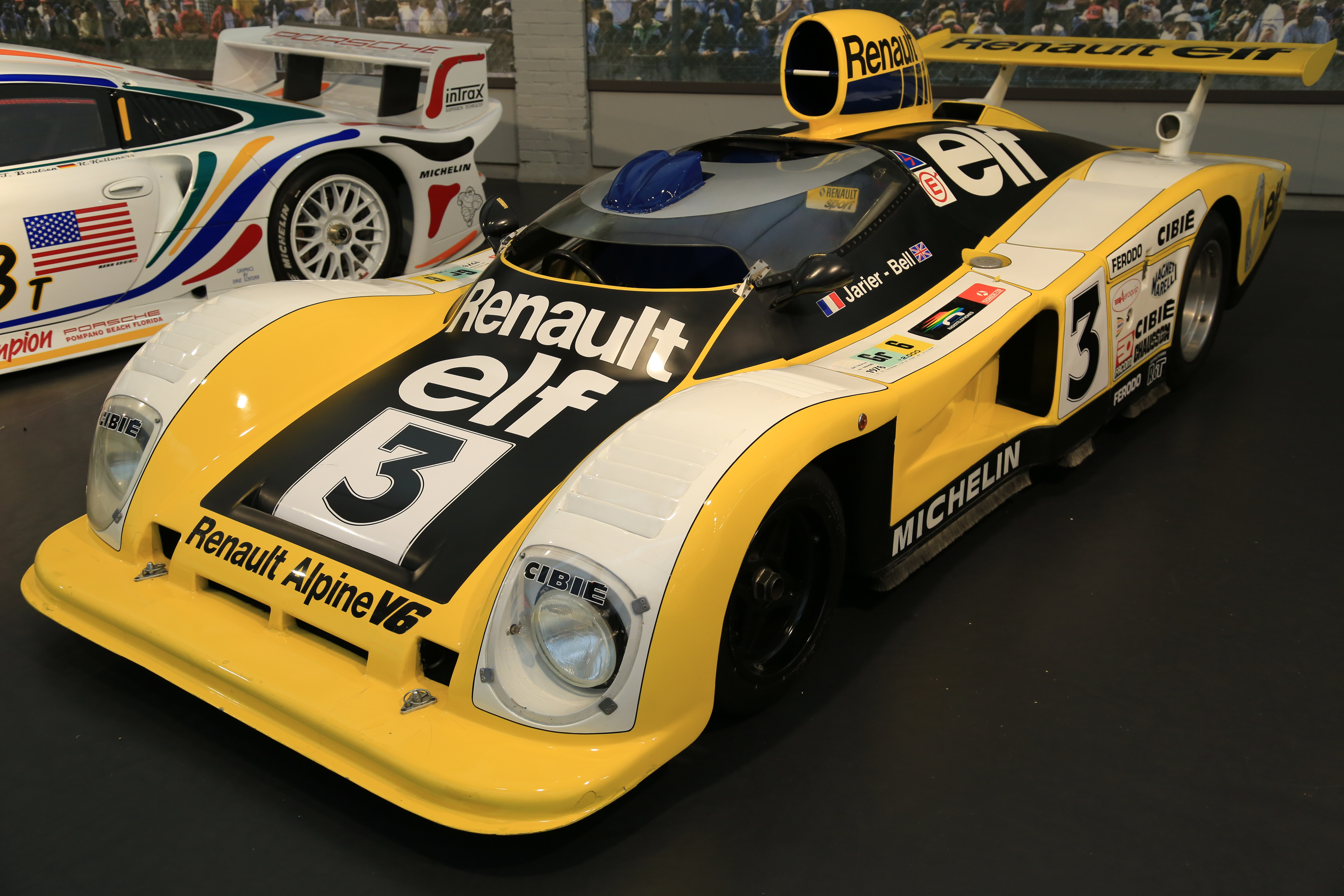 Musée de l'automobile - Mulhouse - Alpine Renault A442 - BH5A5980